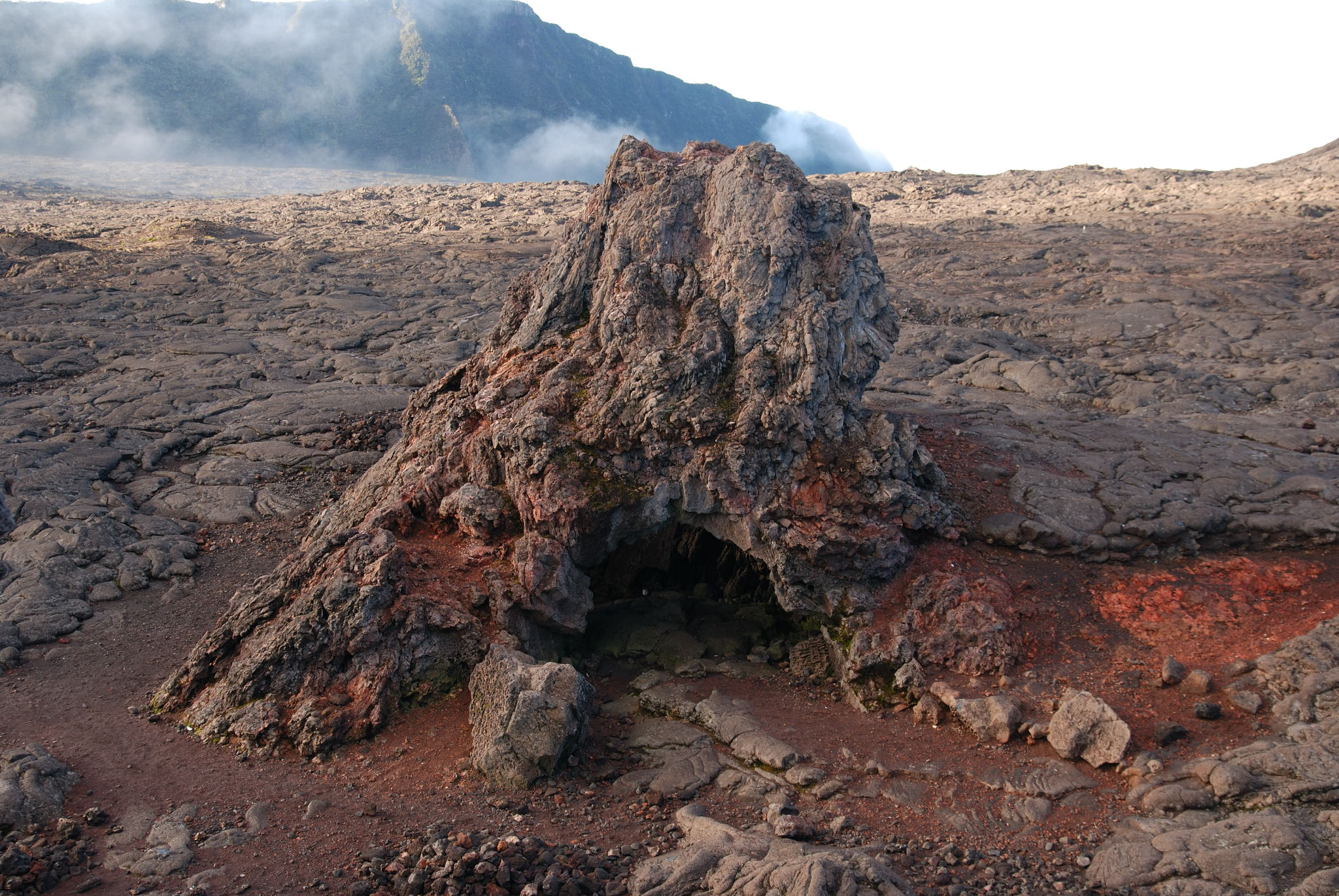 La chapelle de Rosemont est un hornito, c'est a dire une bouche formée par accumulation de laves dans une coulée. La chapelle serait anterieure aux laves qui l'entourent (datées du18eme siecle)